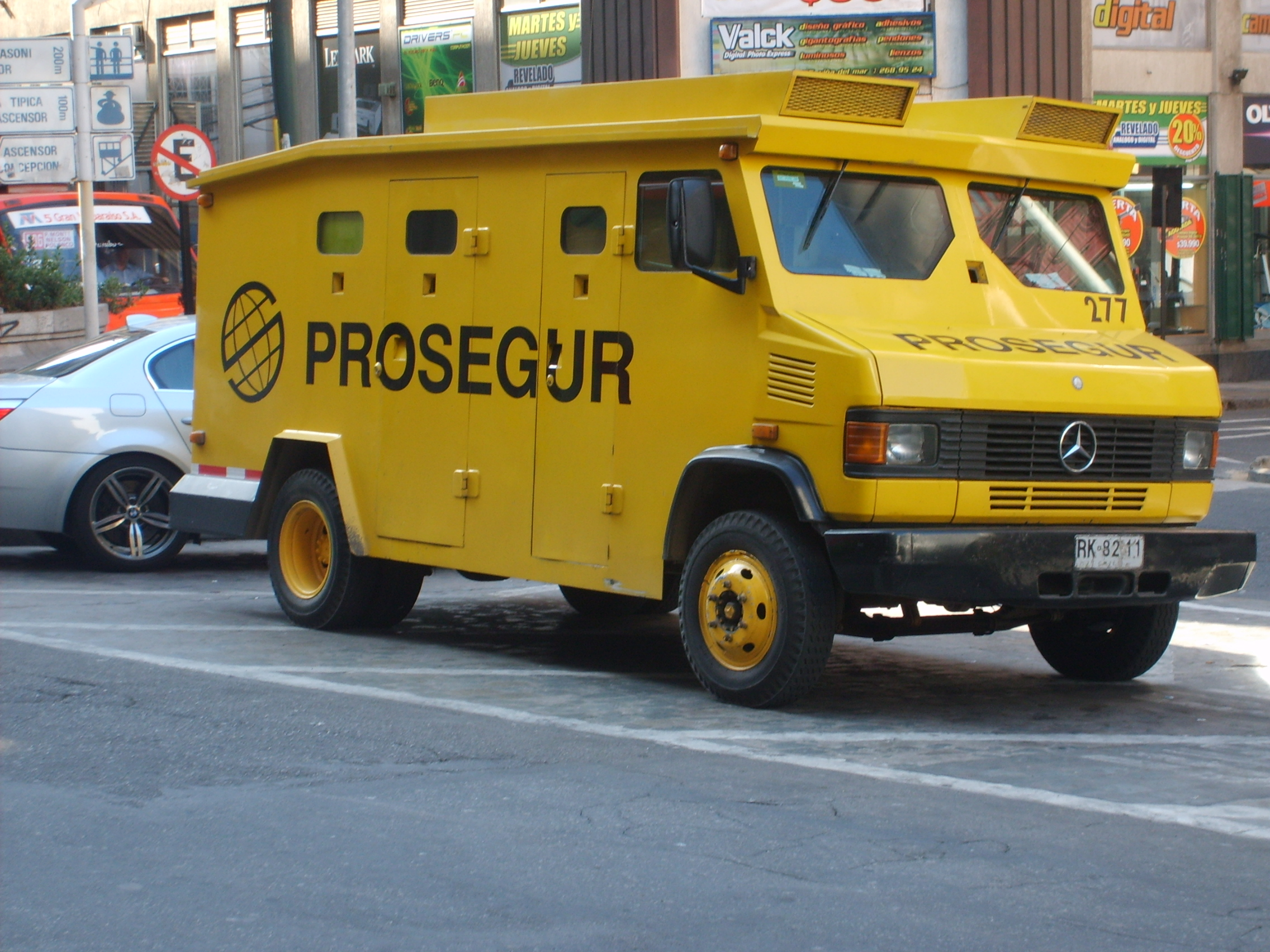 Camion de prosegur cerca del reloj Turri en la ciudad de Valparaiso, Chile.